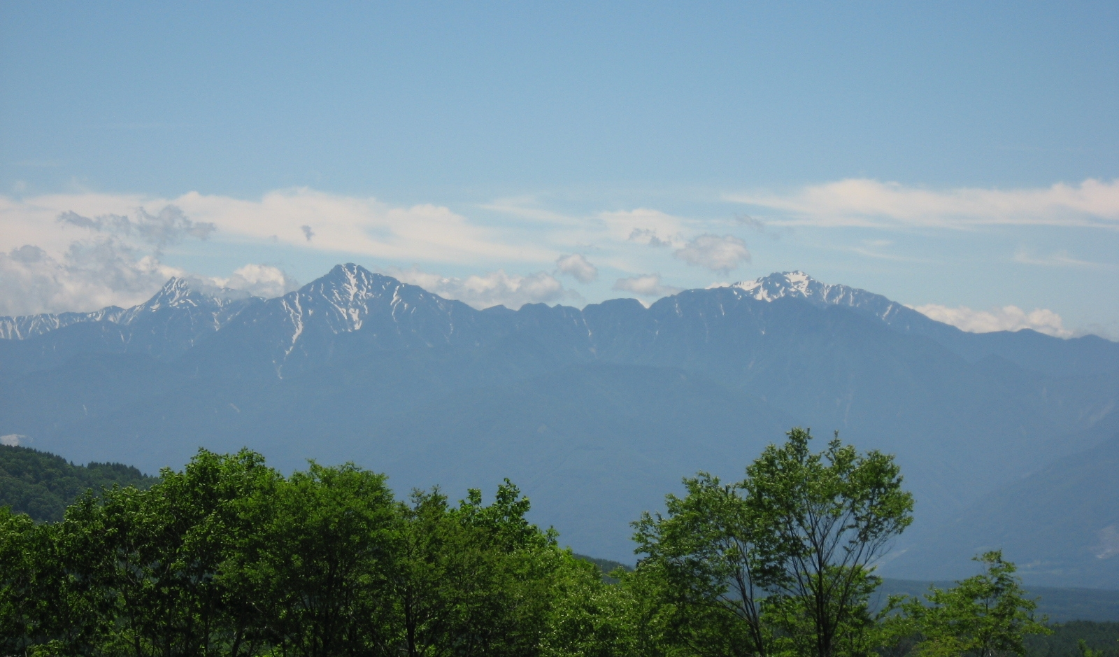 八ヶ岳より南アルプス北部の山々